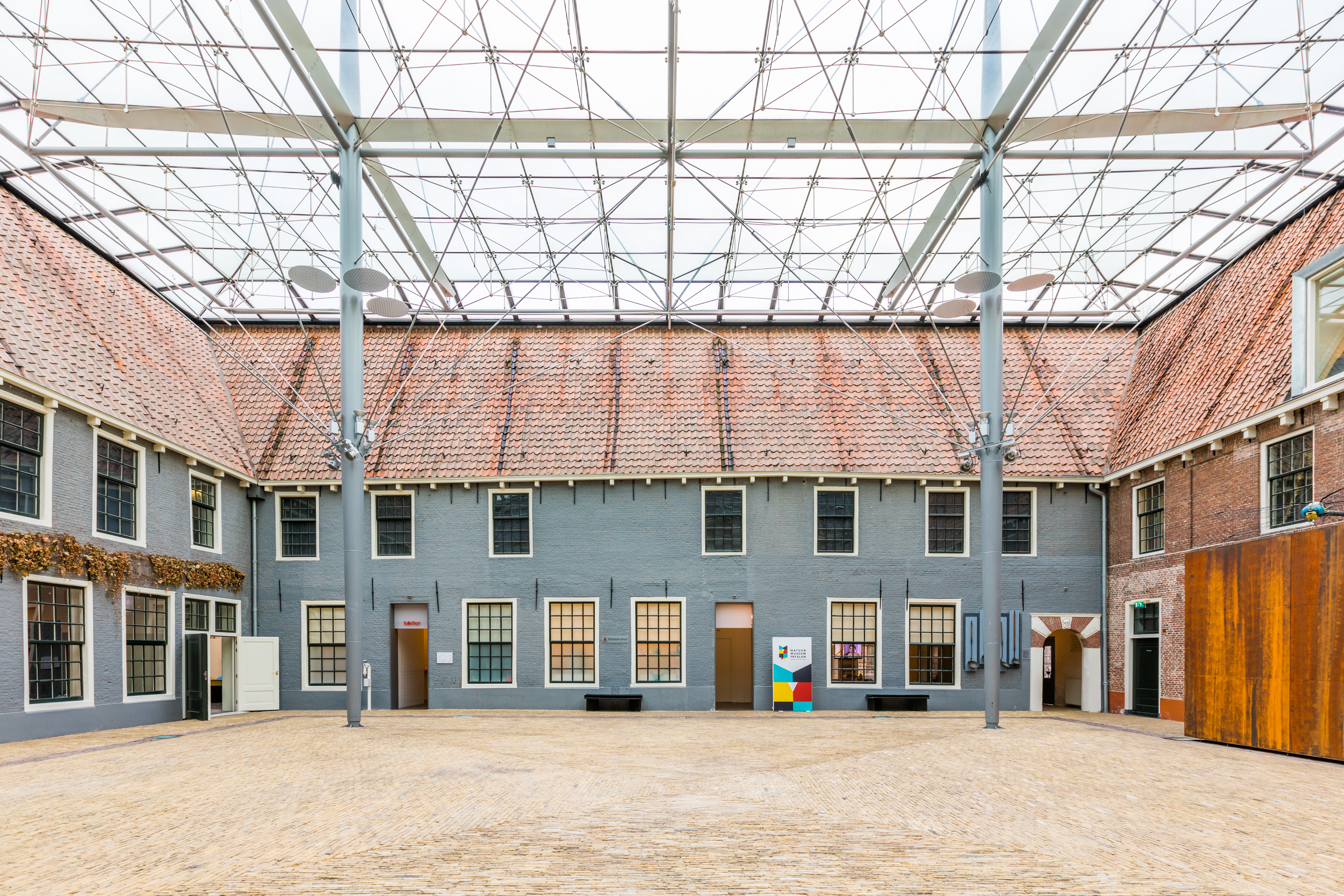 Het Rabobank Atrium is het hart van het museum. Door de glazen kap heeft u een gevoel van binnen en buiten tegelijk.